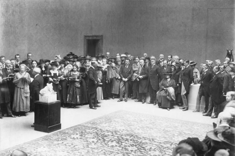 ADN-ZB Berlin: Ende Oktober 1922 wurde in der Akademie der Künste die August-Gaul-Gedächnisausstellung durch Akademiepräsident Max Liebermann eröffnet. Während der Eröffnung der Ausstellung durch Max Liebermann (2), (links daneben) Reichspräsident Friedrich Ebert (1), (weiter links) Staatssekretär Dr. Becker (3), (rechts sitzend) Frau Gaul (4). 10299-22